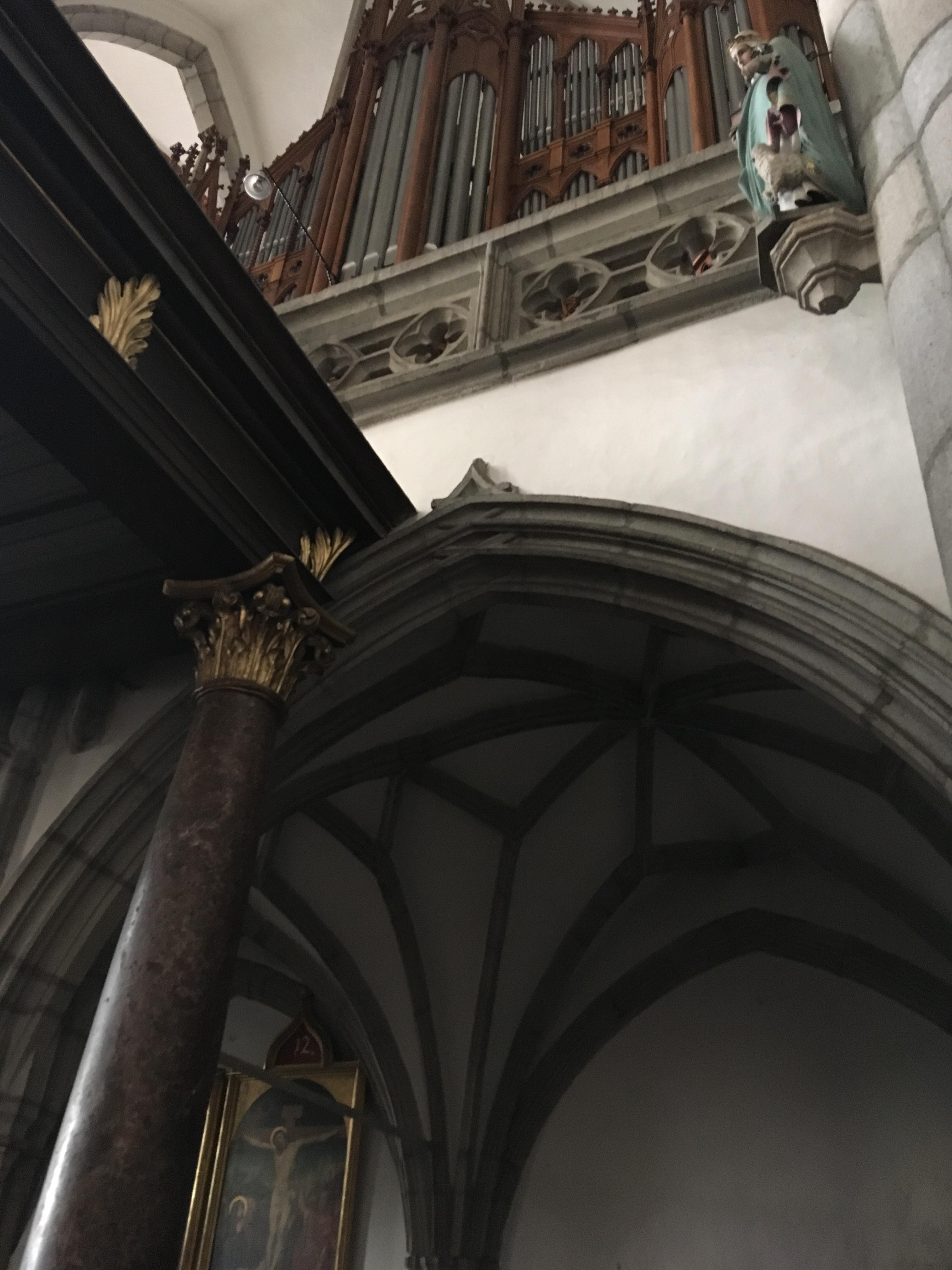 емпора костела святого Віта в Чеському Крумлові